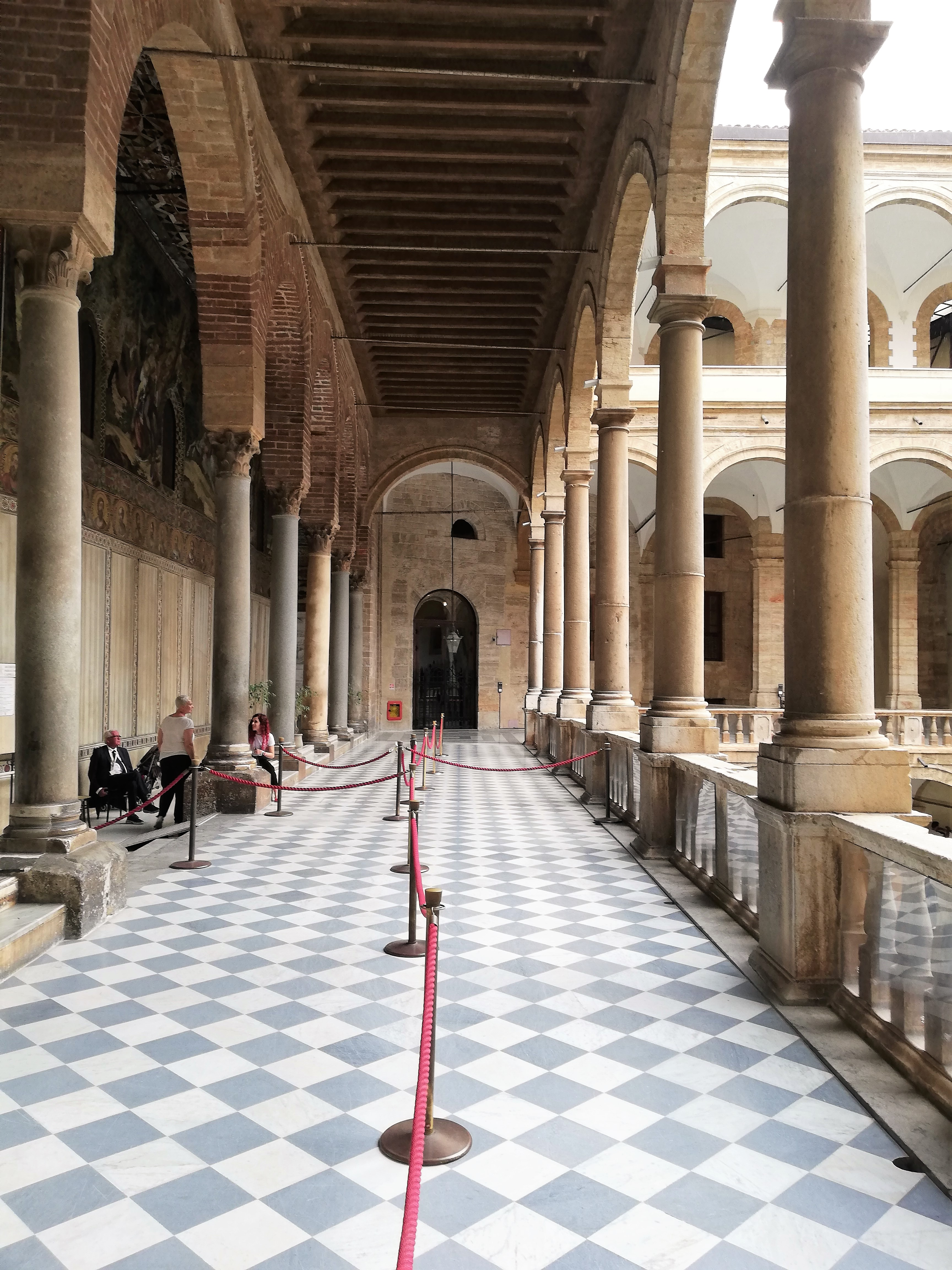 Accesso alla Cappella Palatina.